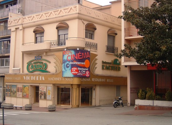 L'un des trois casino de la ville d'Aix-les-Bains en France dans le département de la Savoie. Ce casino s'appelle Le Nouveau Casino (Le Victoria).